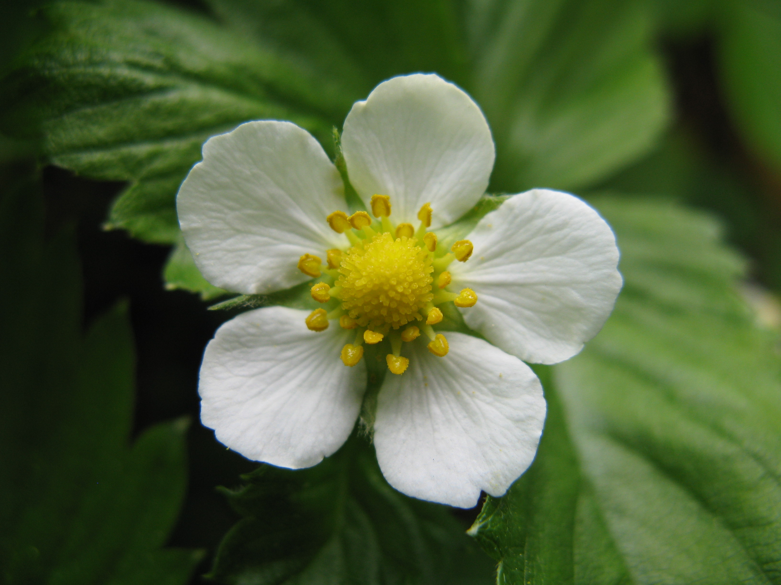 Fragaria vesca